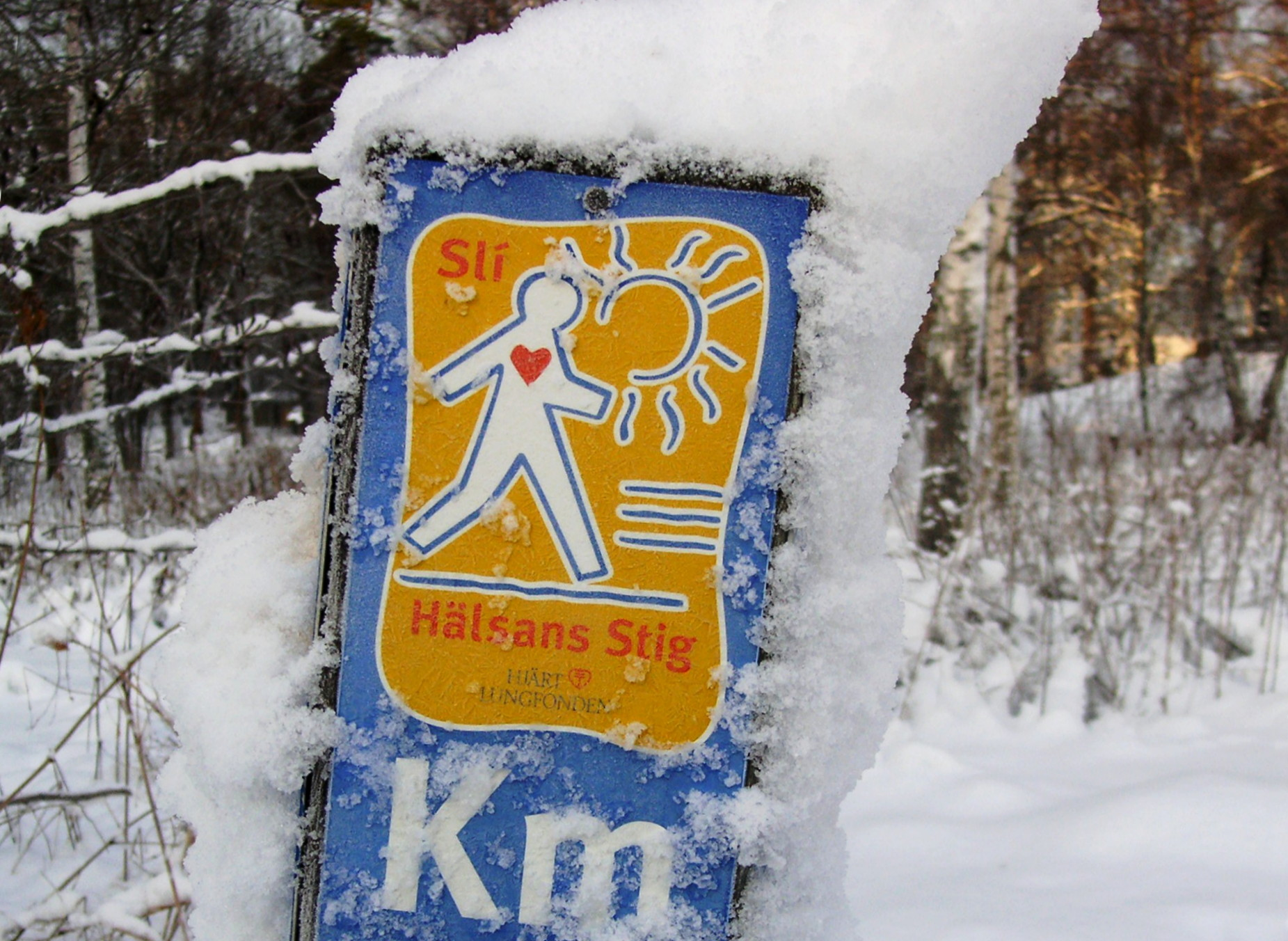 Kilometermarkeringen på Hälsans Stig i Hagaparken